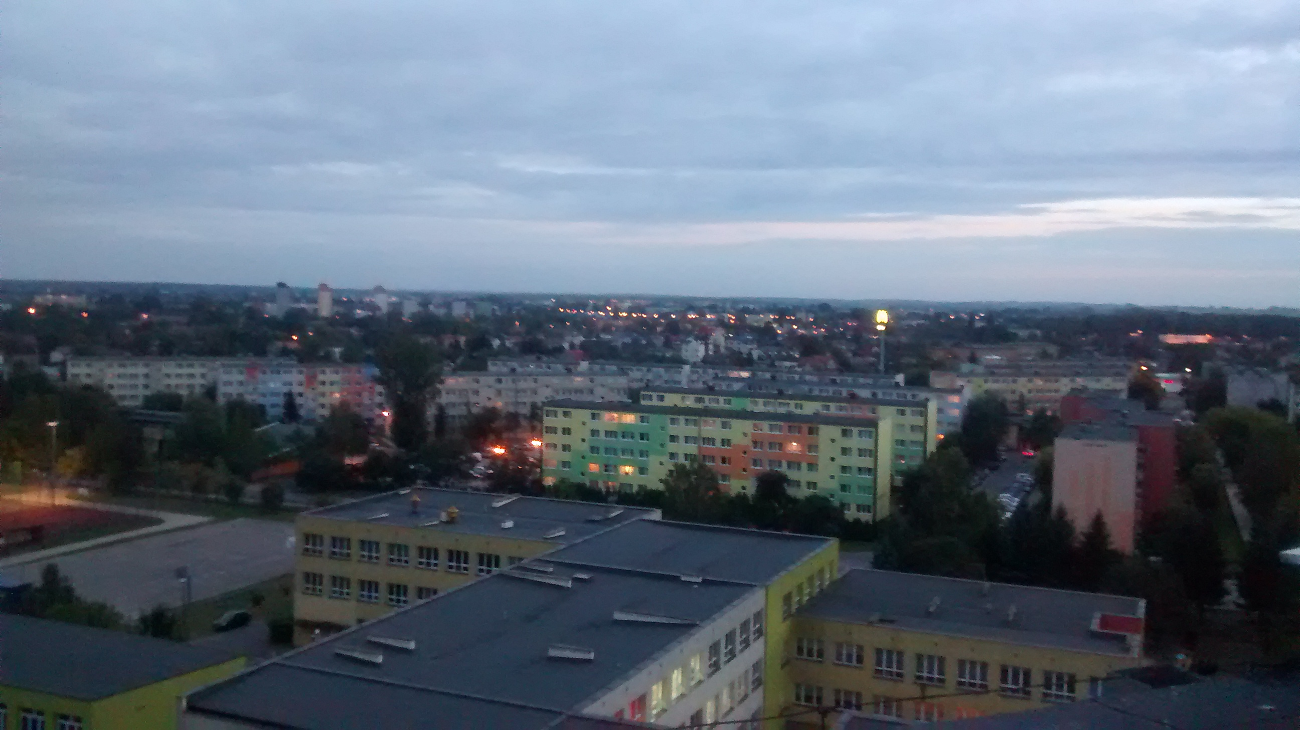 Skierniewice - widok na miasto